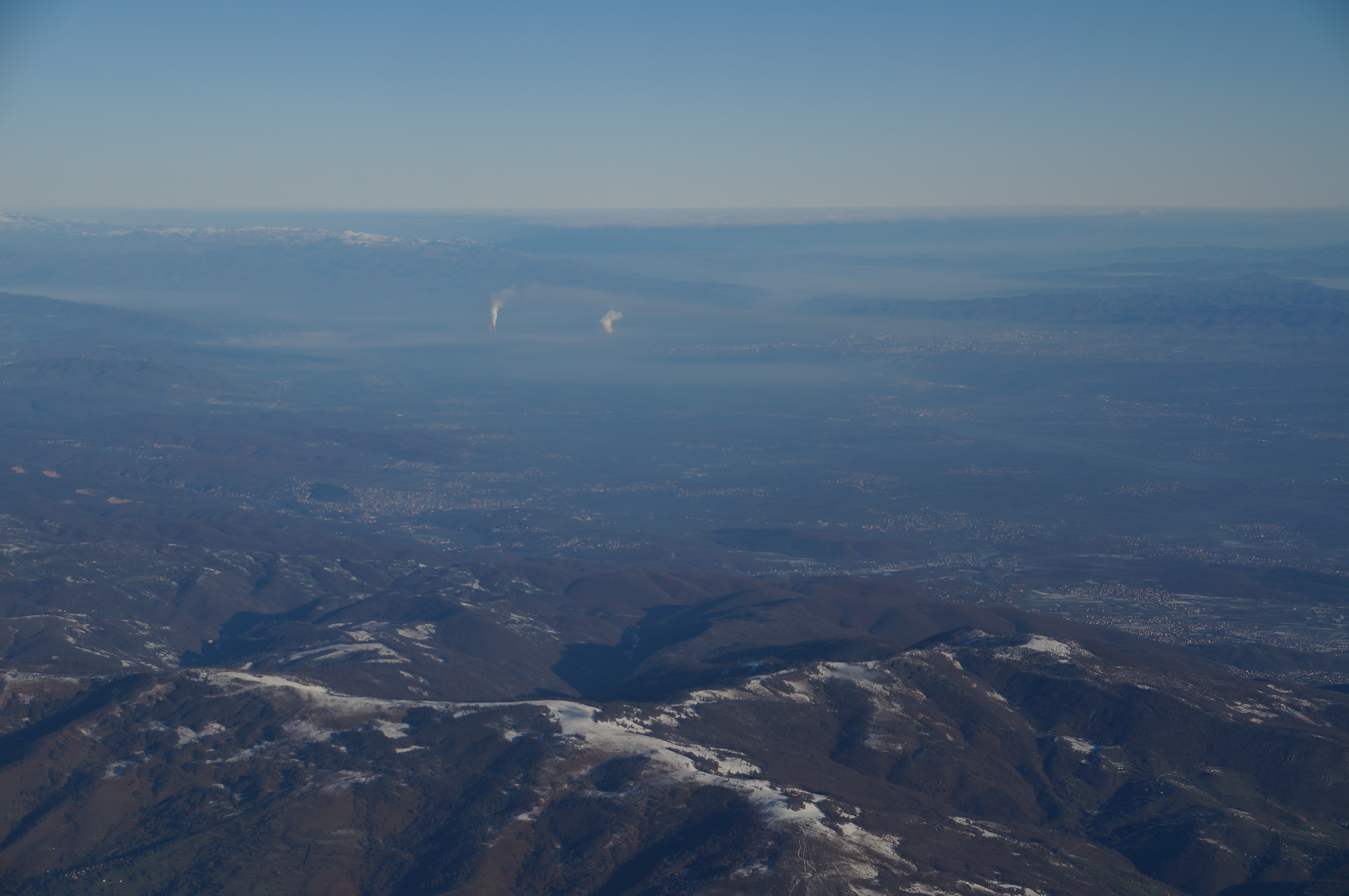 Fushë Kosovo/Kosovo Polje from South